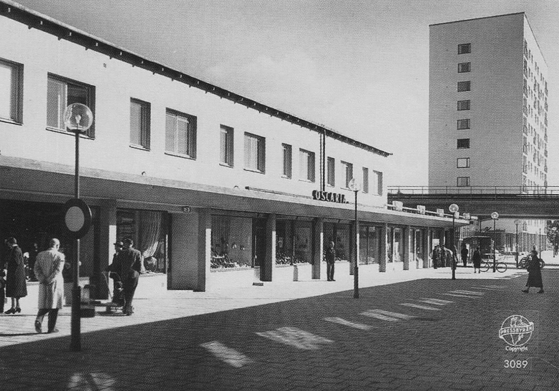 Bandhagen, Torget (Bandhagens centrum) med höghuset och tunnelbanan